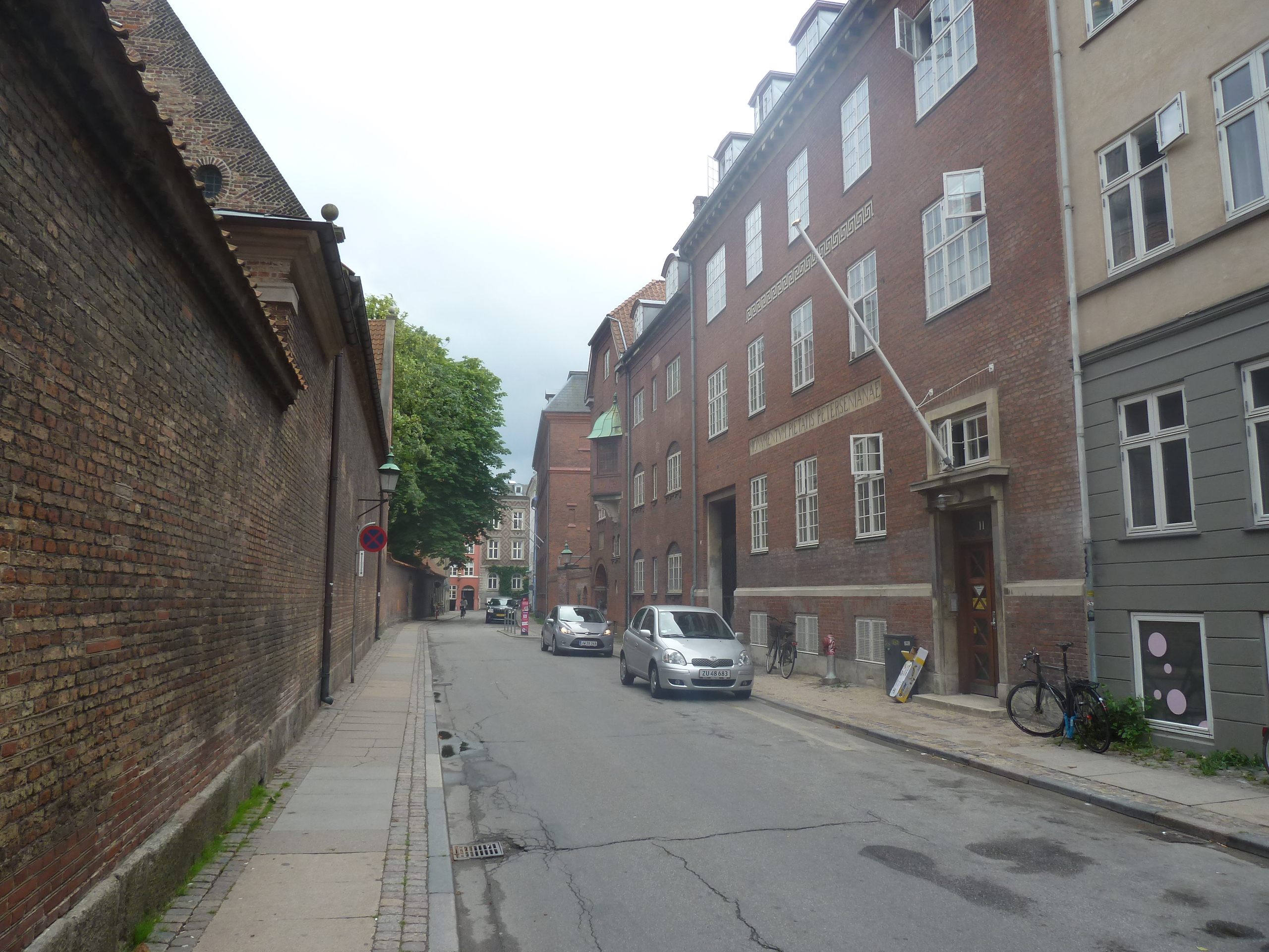 The street Larslejsstræde in Indre By in Copenhagen.